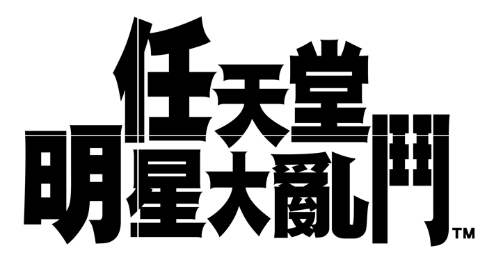 任天堂明星大亂鬥 繁體中文標題